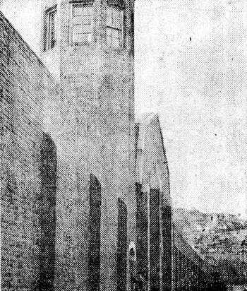 1938년 당시의 서대문형무소